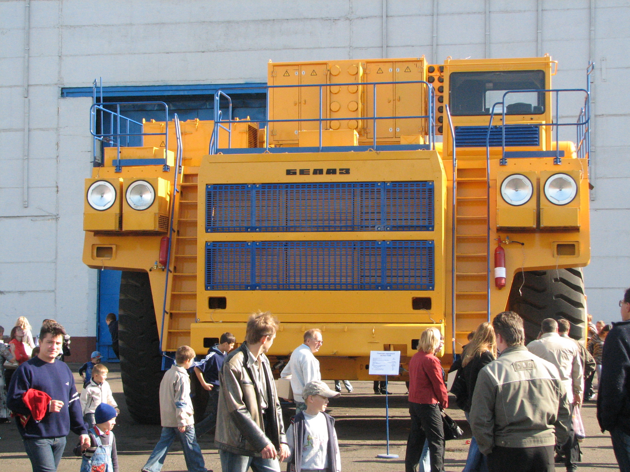 Жодино. День открытых дверей на БелАЗе.